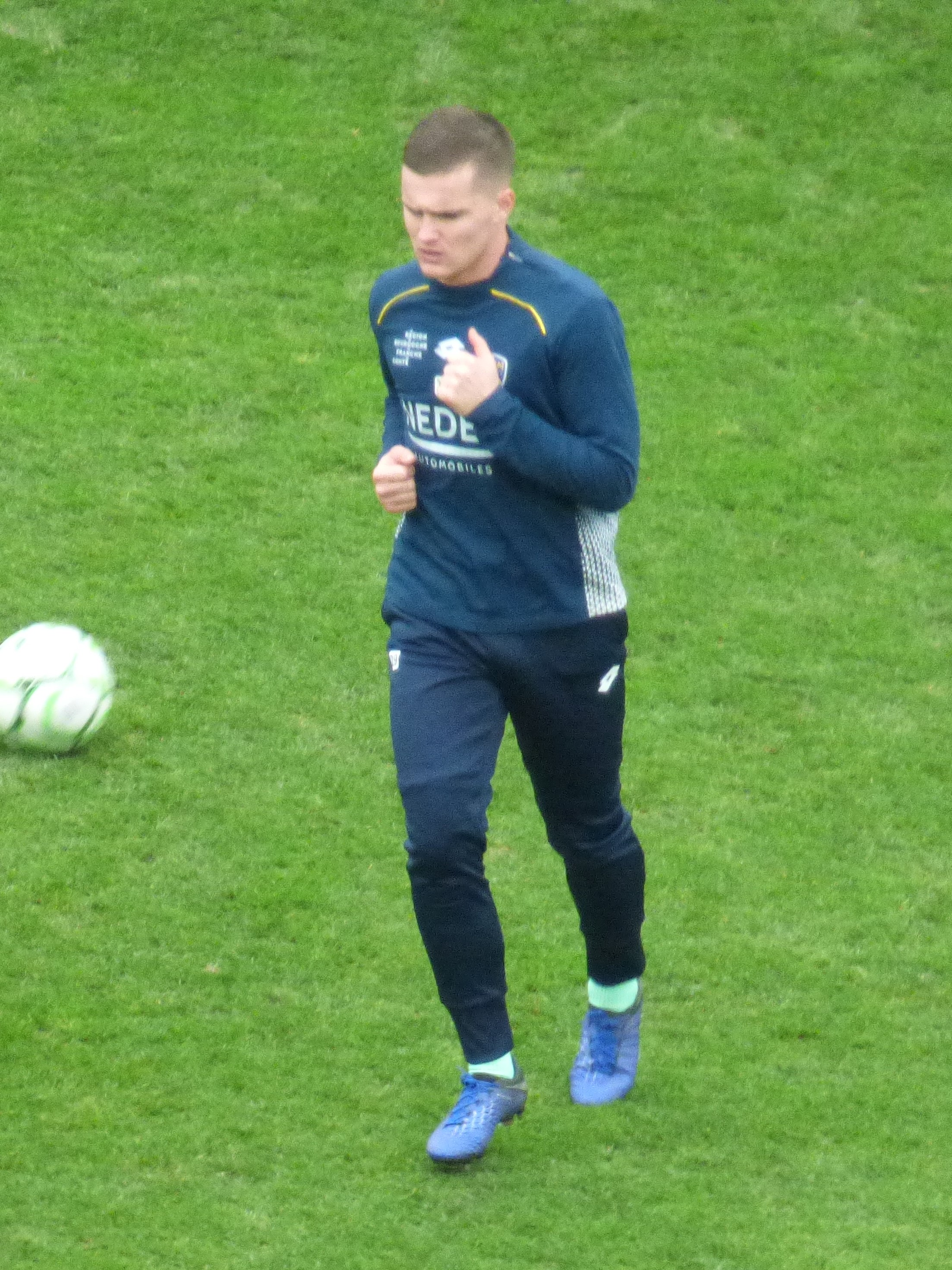 Jérémy Livolant avant le match RC Lens / FC Sochaux, comptant pour la quinzième journée du championnat de France de Ligue 2 de football 2019-2020, le 23 novembre 2019, au Stade Bollaert-Delelis.